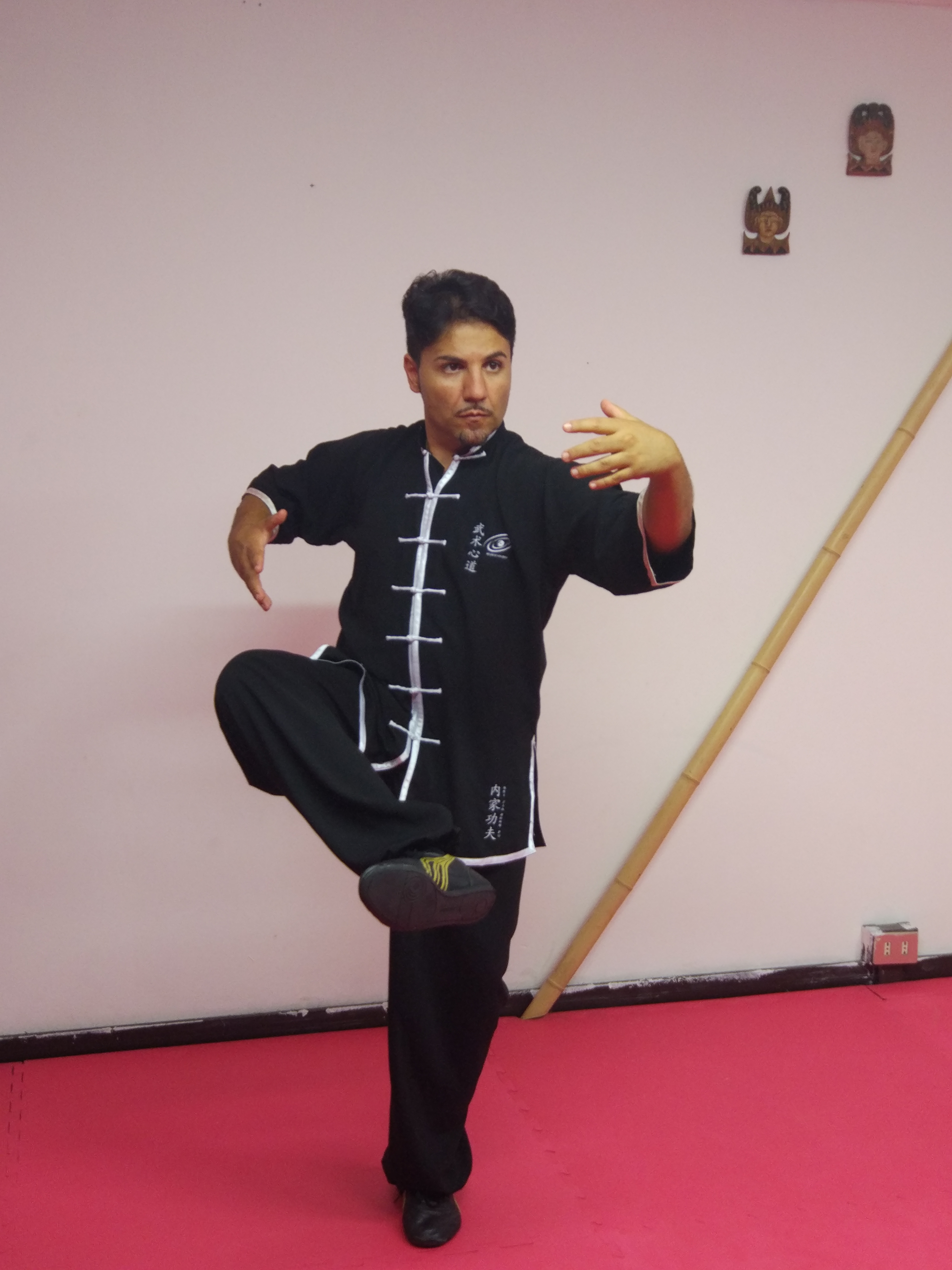 Il Maestro Marco Gamuzza esegue la posizione di Zhan Zhuang più nota: Hun Yuan Zhuang (con variante in dulibù).